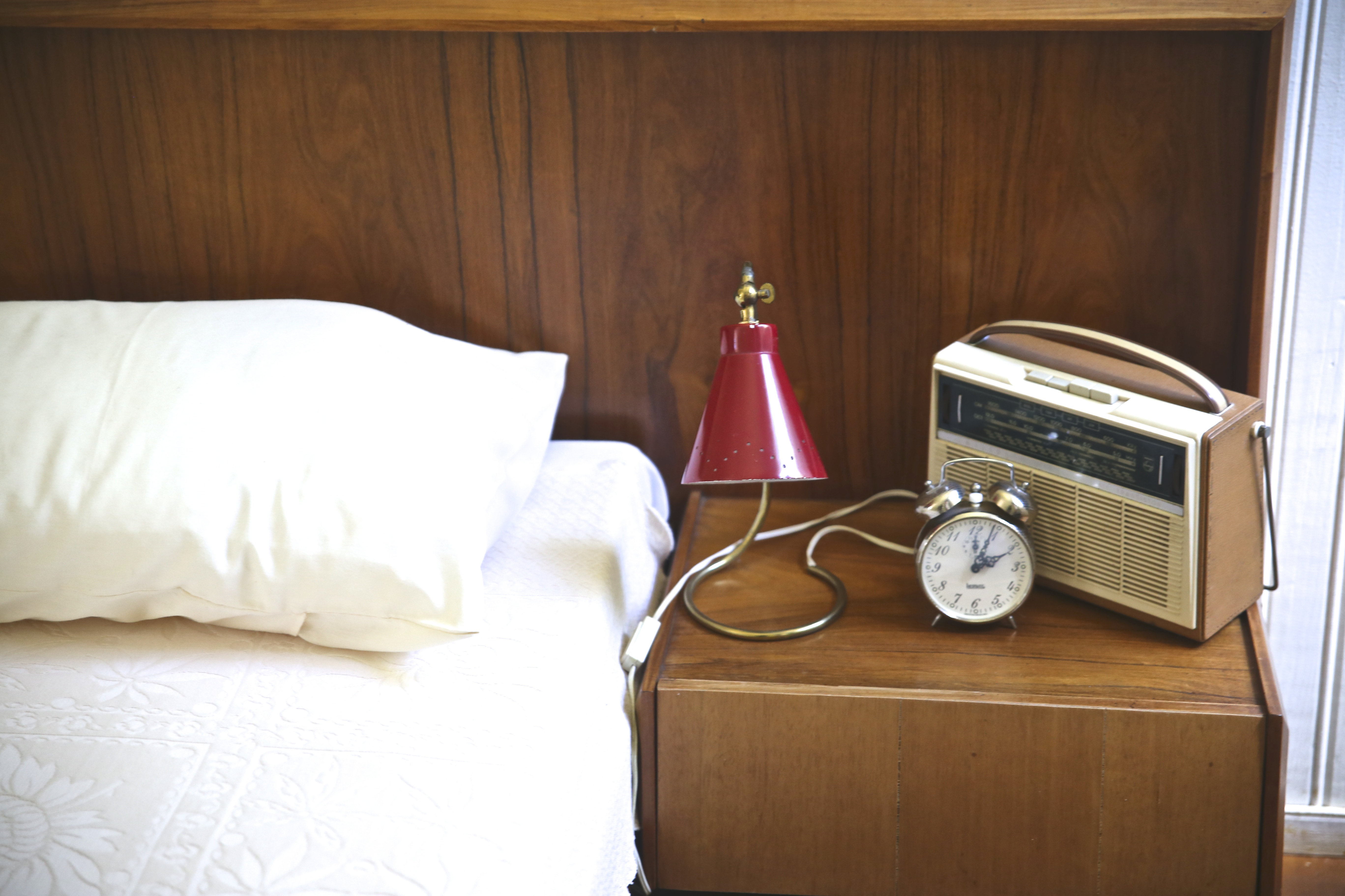 Na cabeceira do quarto do casal se encontra o rádio de pilha, o relógio e o abajur.